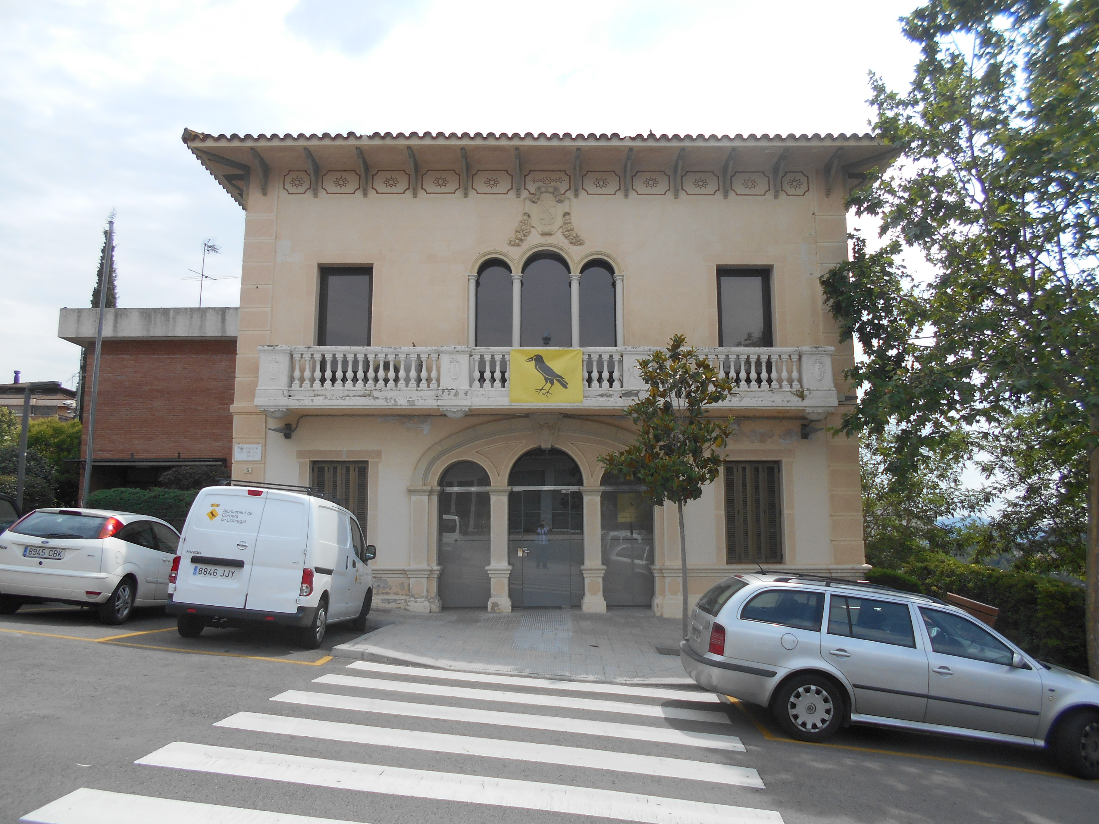 Ayuntamiento de Corbera de Llobregat.